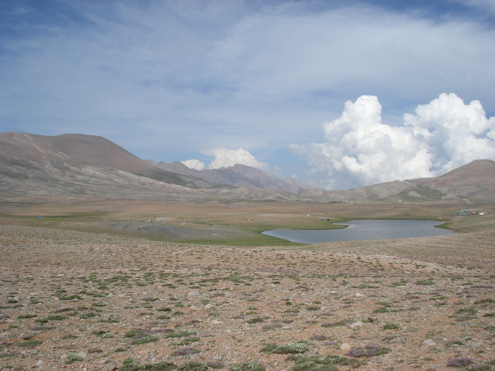 Mersin, Çamlıyayla, Yazıgöl